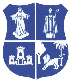 Nuevo escudo de Asunción